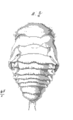 Zeichnung einer Puppe der Gattung Agabus nach Schiødte 1865